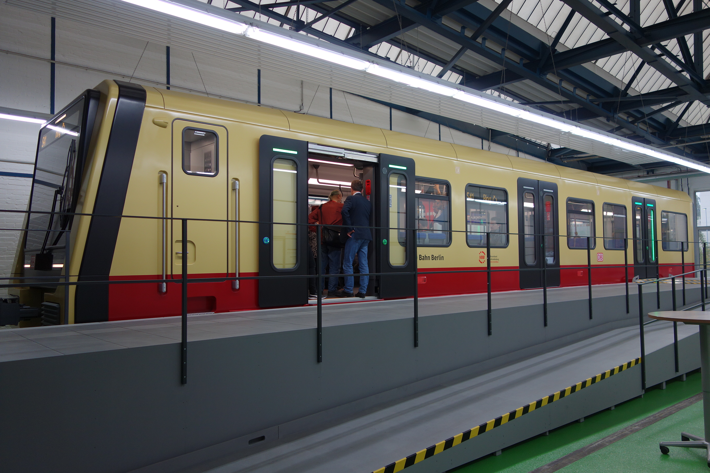 S-Bahn Berlin, Mock-Up eines Wagens der DB-Baureihe 483/484